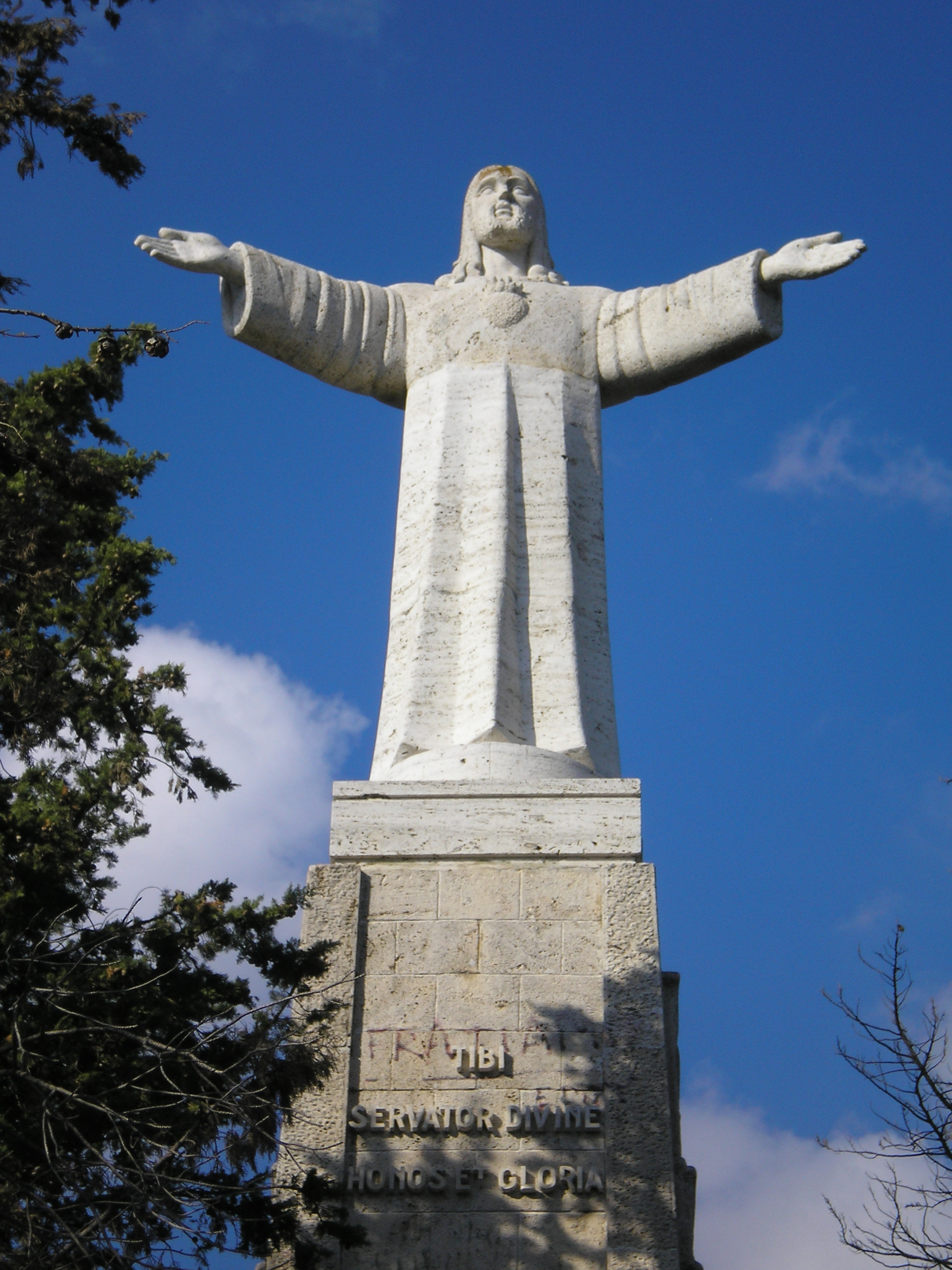 Statua del Cristo Redentore di Ascoli Piceno. Opera del 1954.